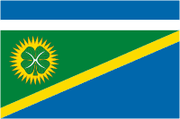 Флаг Вознесенского сельского поселения, Краснодарский край, Россия.